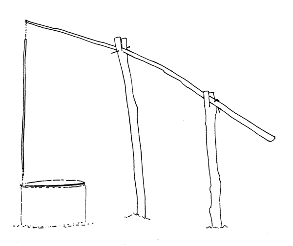 Puits à balancier à Sabres, département des Landes, France (dessin d'après une photo des années 1970) / Balancing well at Sabres, Landes department, France (sketch from a photo taken in the 1970s)